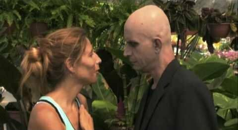 רפי אדיר ואיריס מורגנבסר בסרטם של איתן גפני ויוני גבע: מגע של מוות